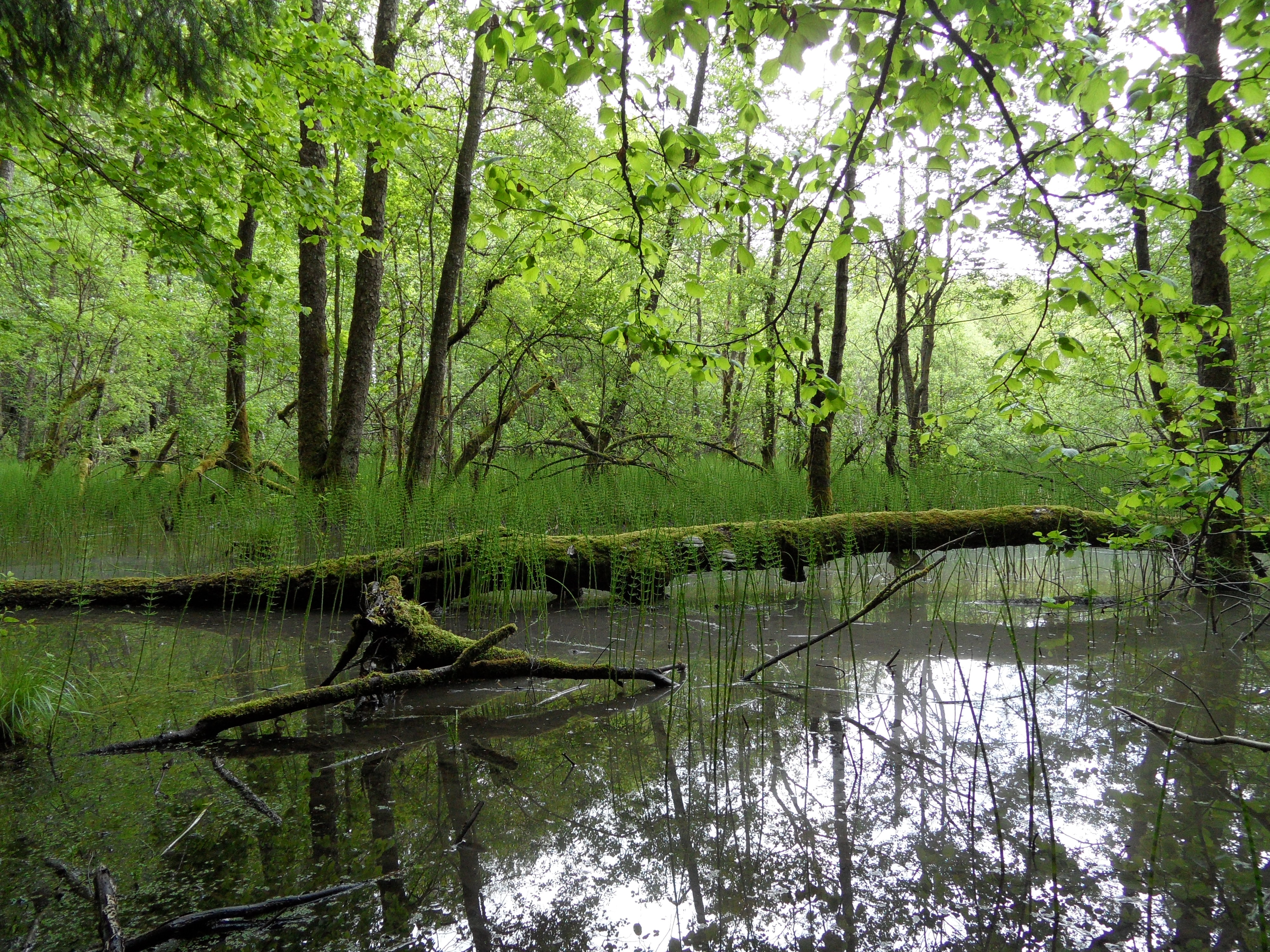 Naturreservatet Tegeldammarna/Lergravarna sumpskog